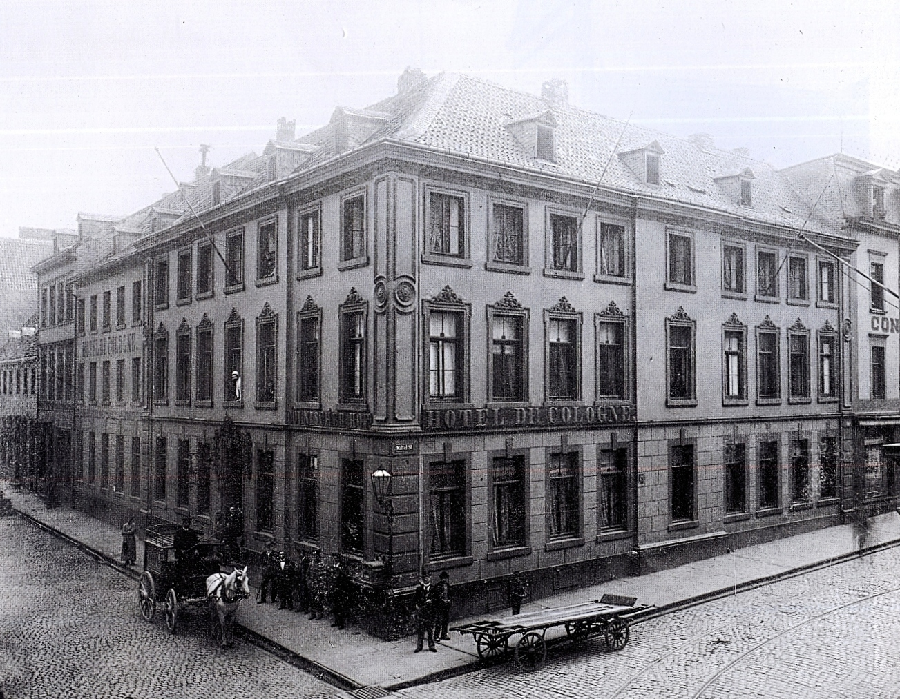 Flinger Straße 23, vor 1890.